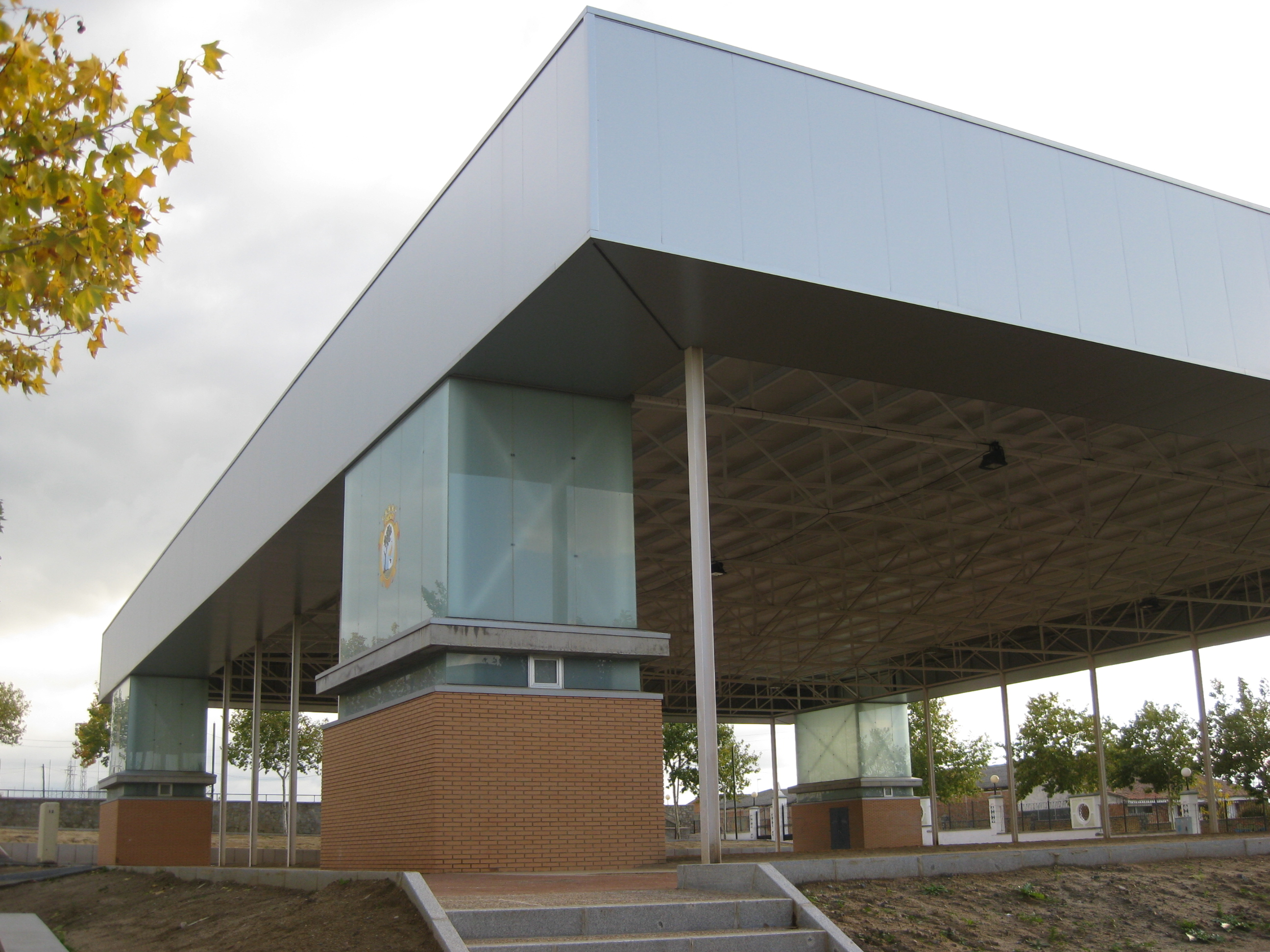 Recinto Ferial